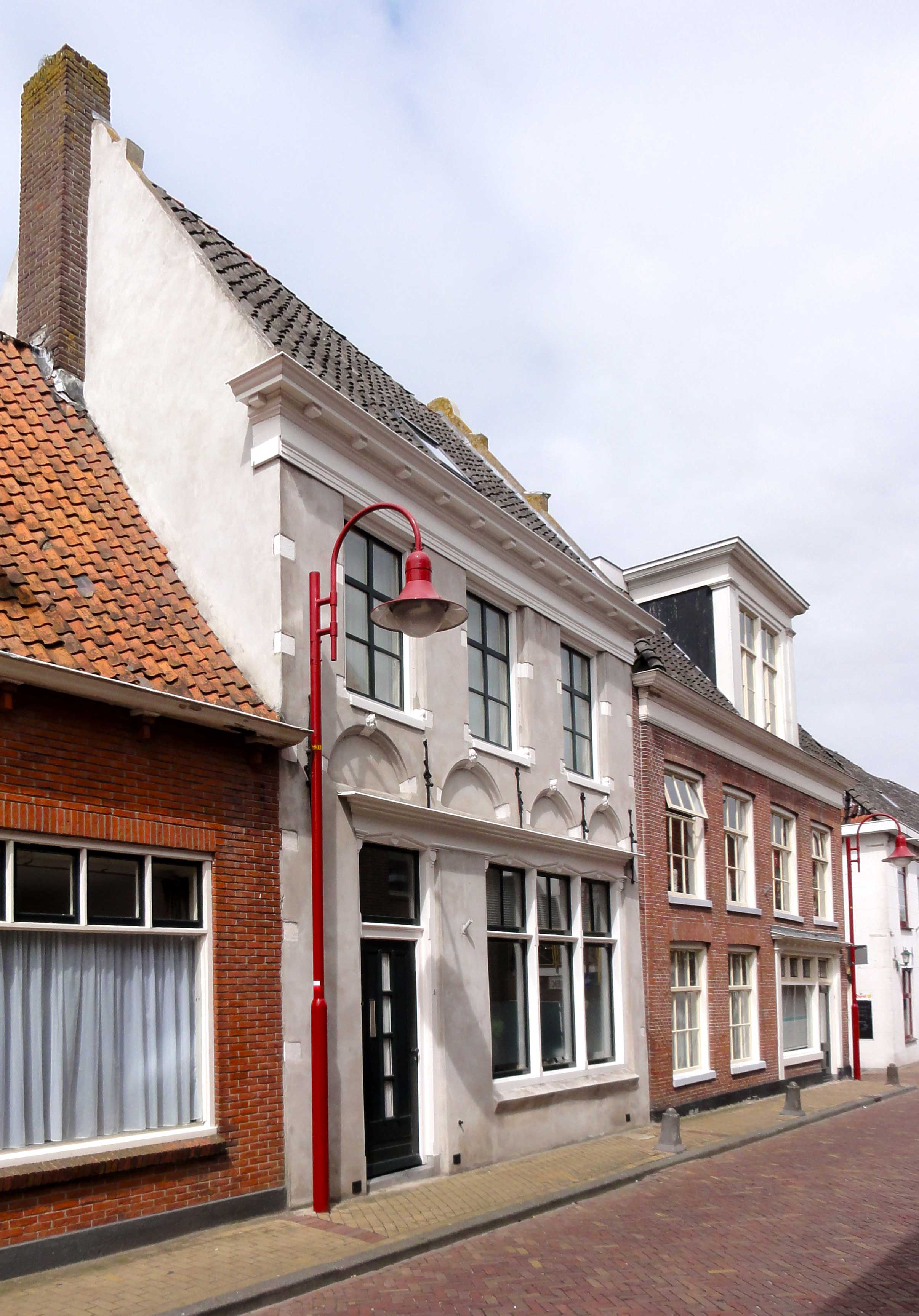 Kerkstraat 5 te Makkum